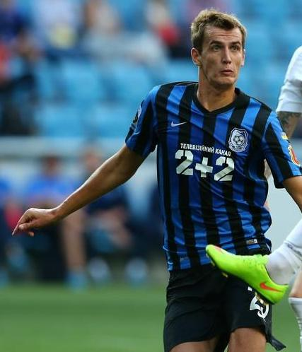 Євген Мартиненко - футболіст Чорноморця (Одеса)